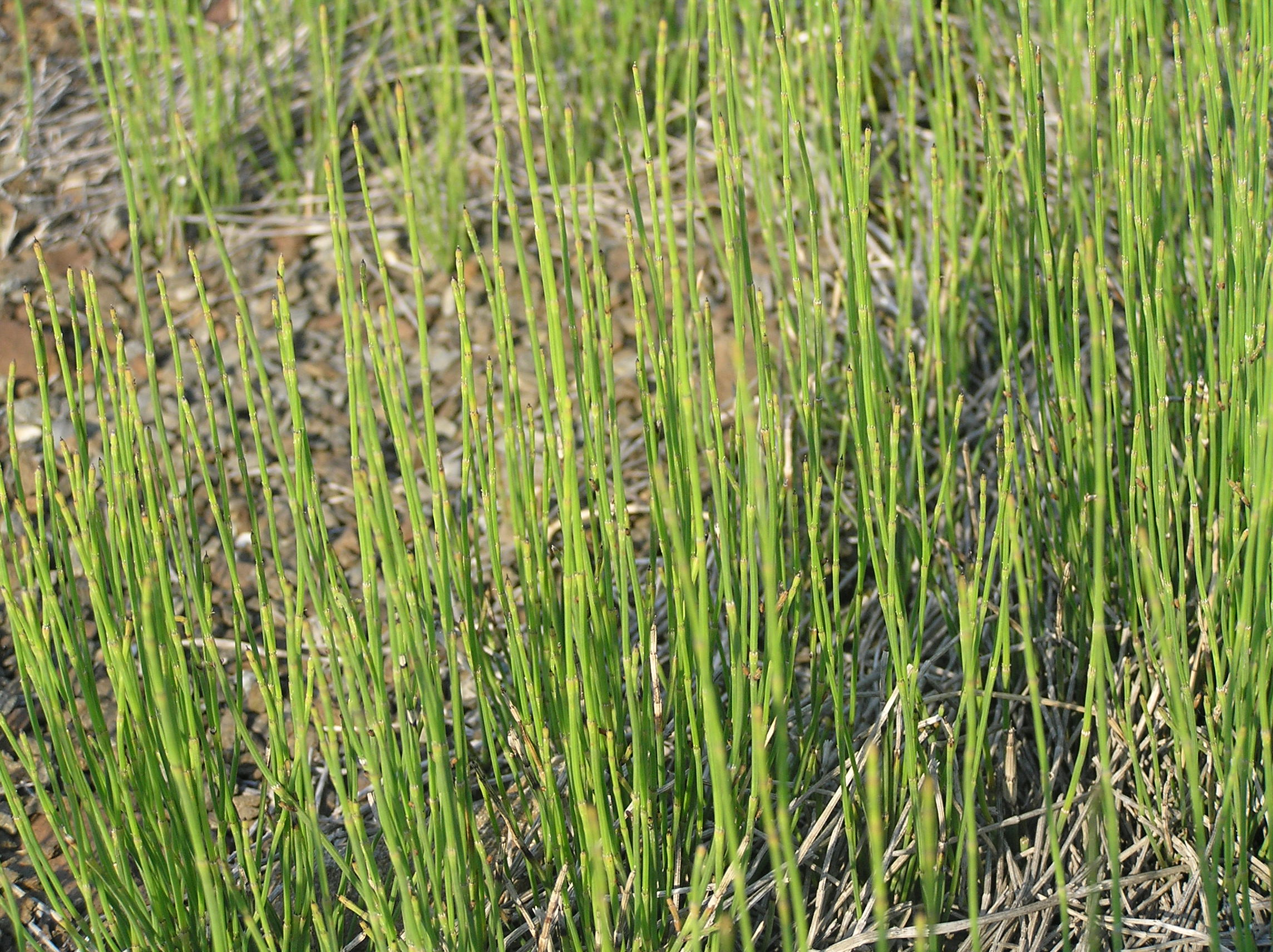 Equisetum ramosissimum, Slavičín, Czech Republic